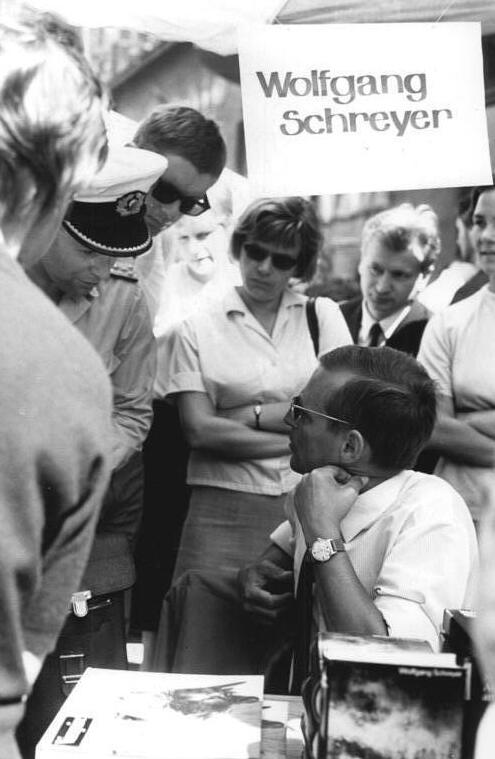 Zentralbild Raphael 13.7.1967 10. Ostseewoche 1967 Rostock: Buchbasar mit prominenten Autoren Bei einem Buchbasar anlässlich der Jubiläumsostseewoche in der Kröpelinerstraße verkauften und signierten bekannte DDR-Schriftsteller ihre Bücher. Zu den gefragtesten Autoren zählte zweifellos Wolfgang Schreyer (Foto).